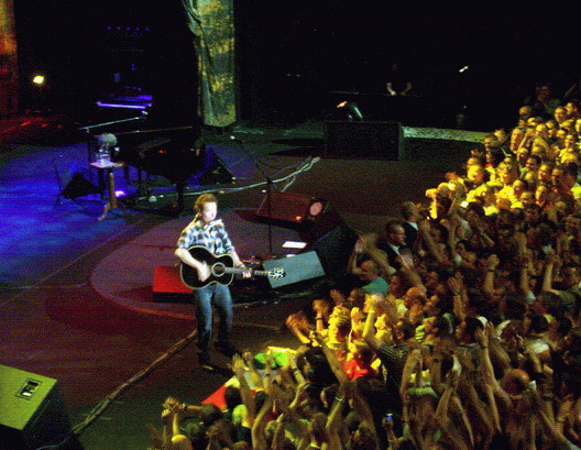 Bruce Springsteen, 15. Juni 2005 in Frankfurt